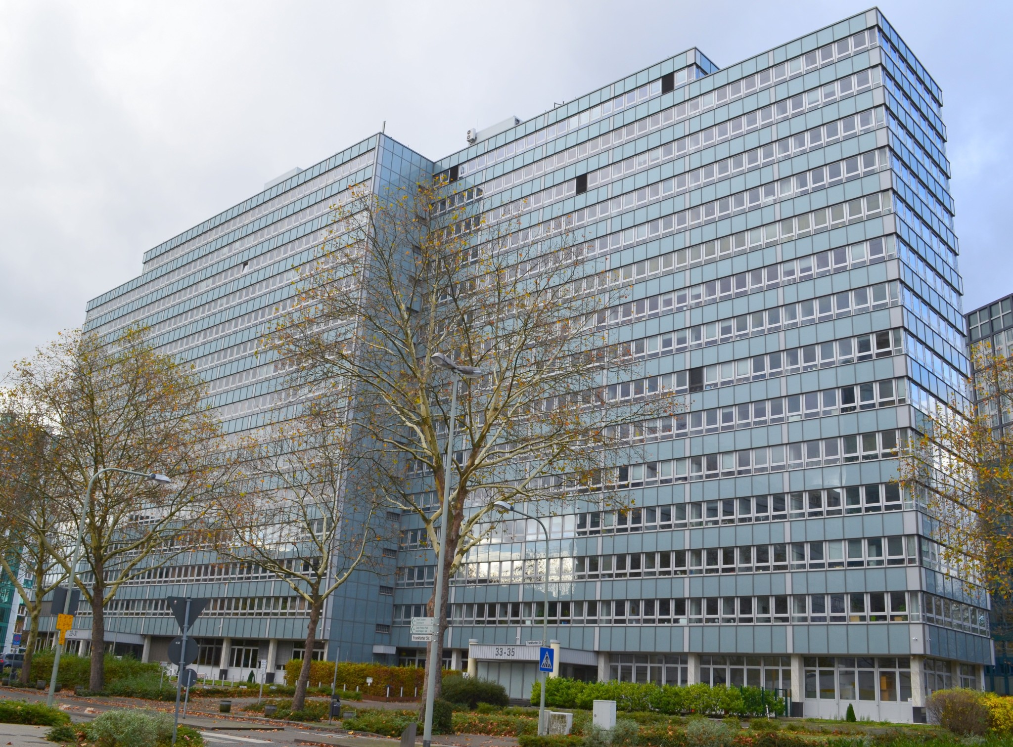 Bundesamt für Wirtschaft und Außenkontrolle, Eschborn